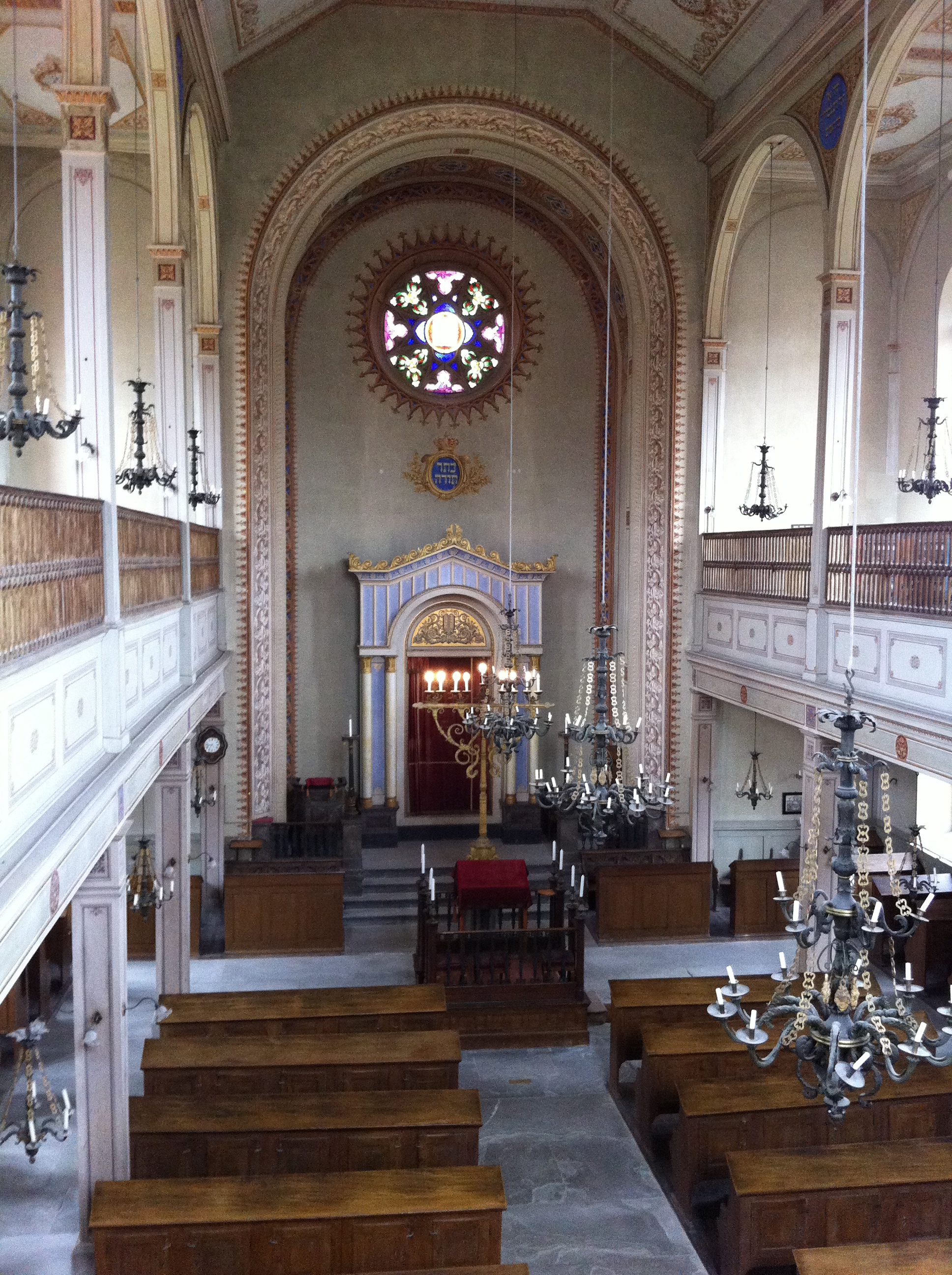 Synagoge Lengnau